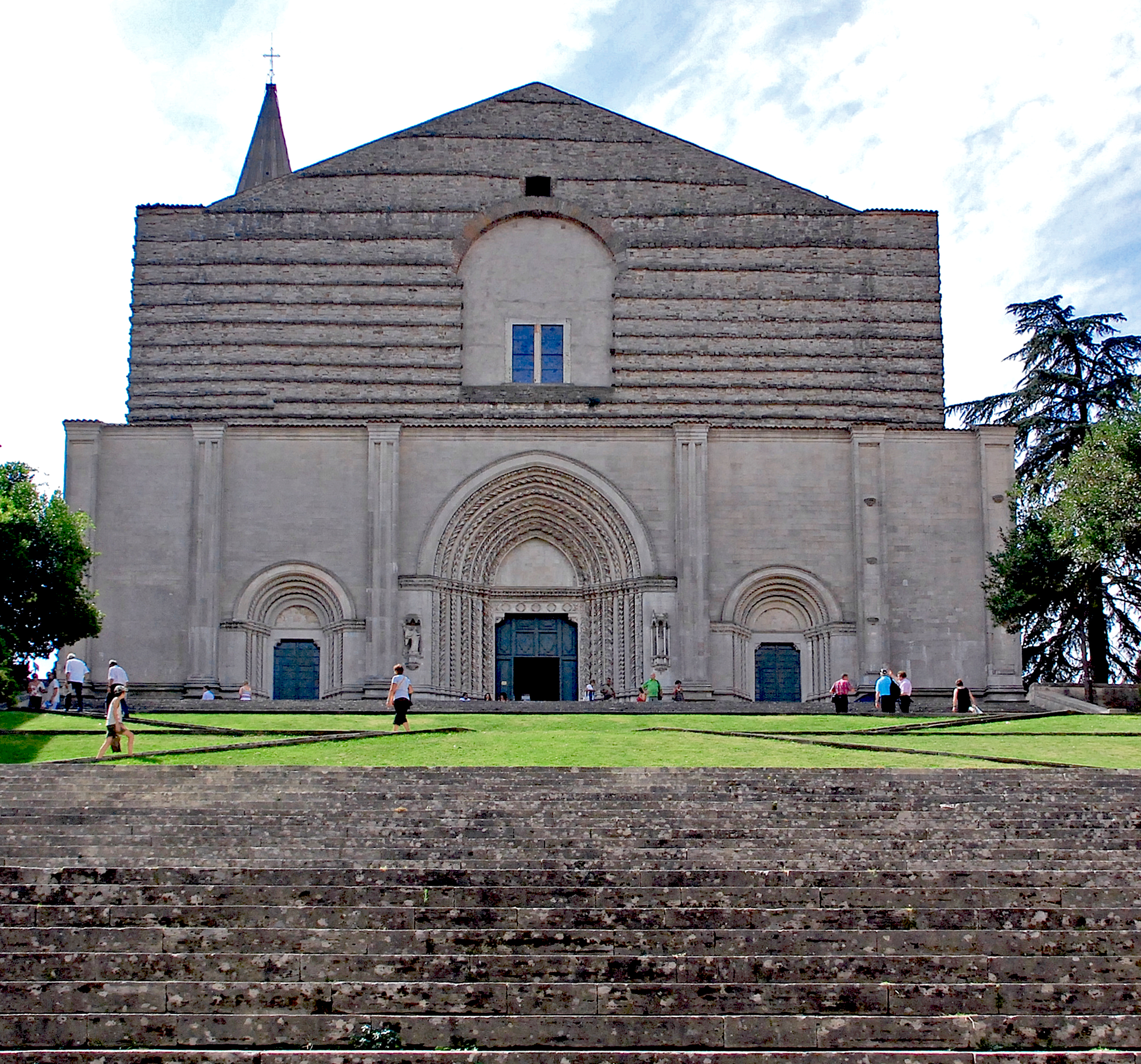 Todi, Tempio di San Fortunato This is a photo of a monument which is part of cultural heritage of Italy.